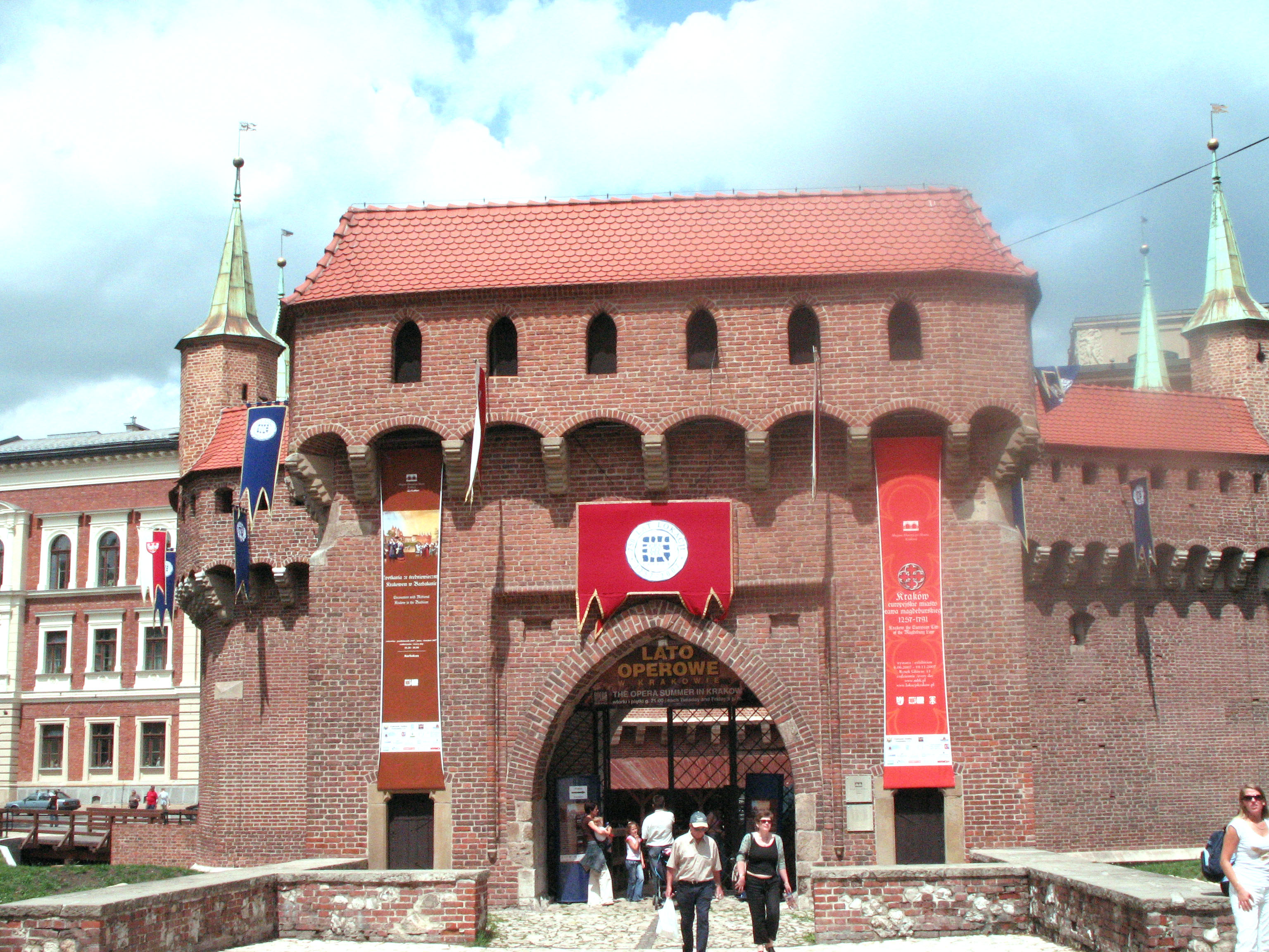 Barbakan in Kraków, Poland